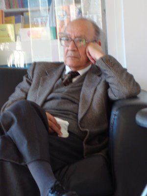 Photo de Moustapha Safouan récupérée sur wikipedia.it